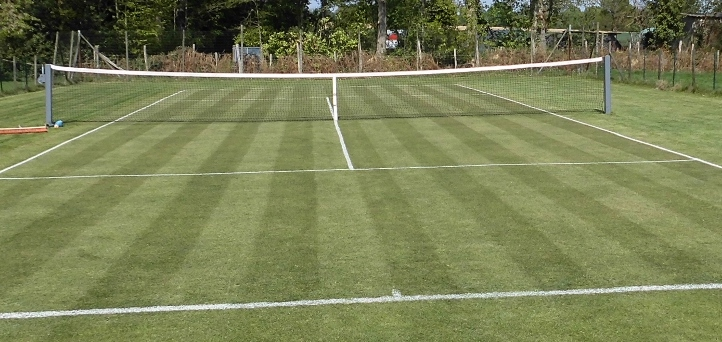 Tennis sur gazon naturel à Thorigné-Fouillard près de Rennes, France